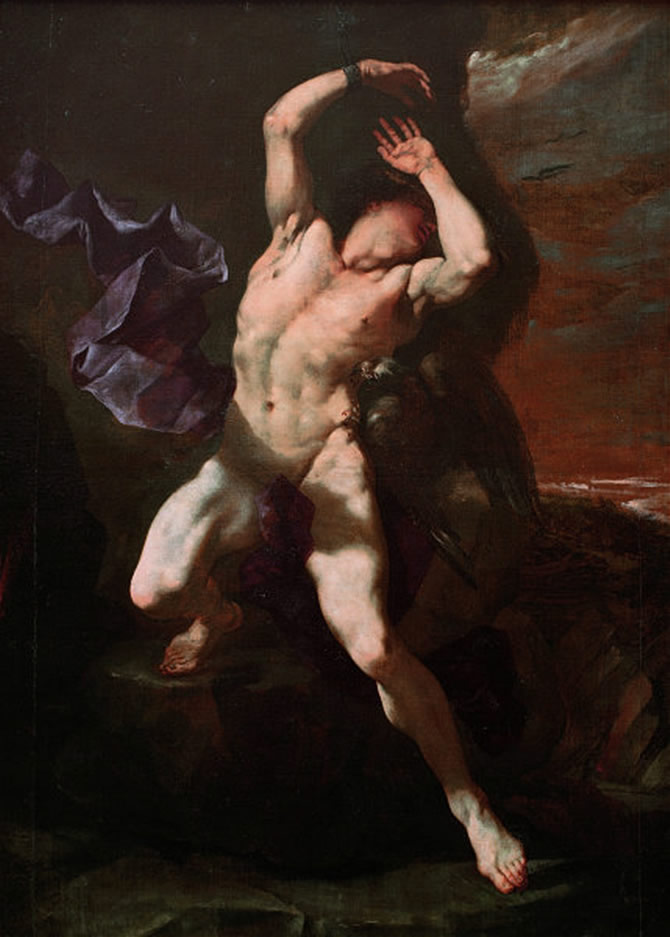 188 × 138 cm